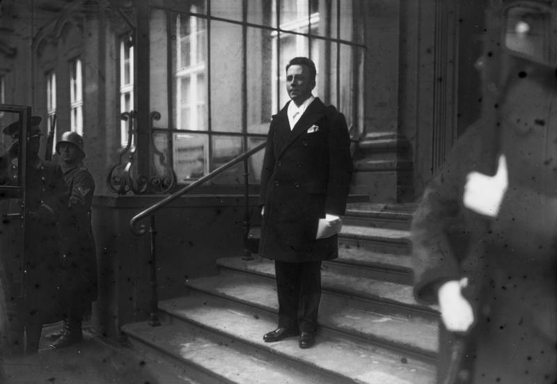 Der neue Gesandte des irischen Freistaates in Berlin Prof. Daniel A. Binchy wurde vom Reichspräsidenten von Hindenburg zur Entgegennahme seines Beglaubigungsschreibens empfangen! Der neue Gesandte des irischen Freistaates in Berlin, Prof. Daniel A. Binchy verlässt das Reichspräsidentenpalais in der Wilhelmstrasse.